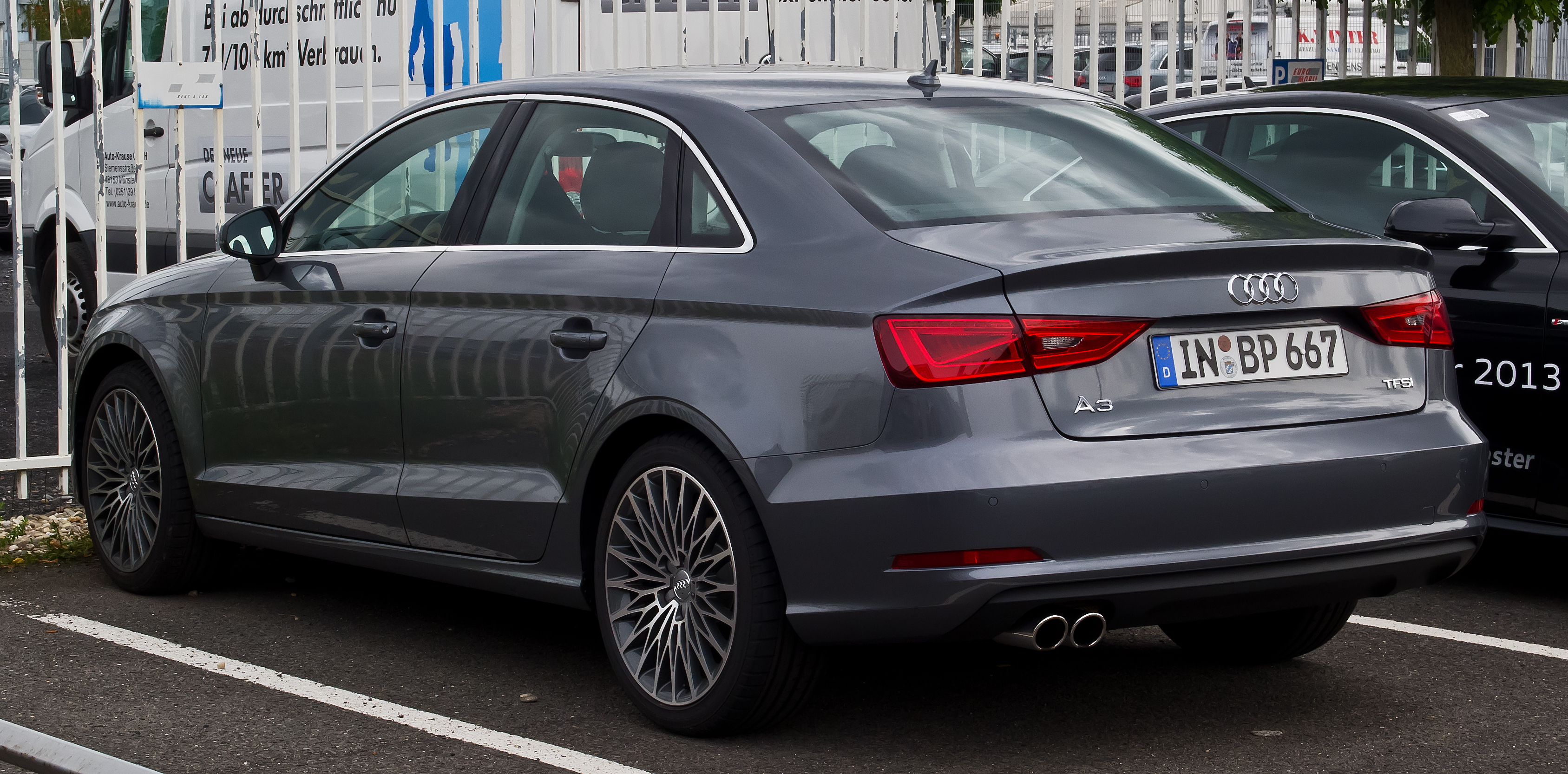 Audi A3 Limousine TFSI Ambiente (8V)